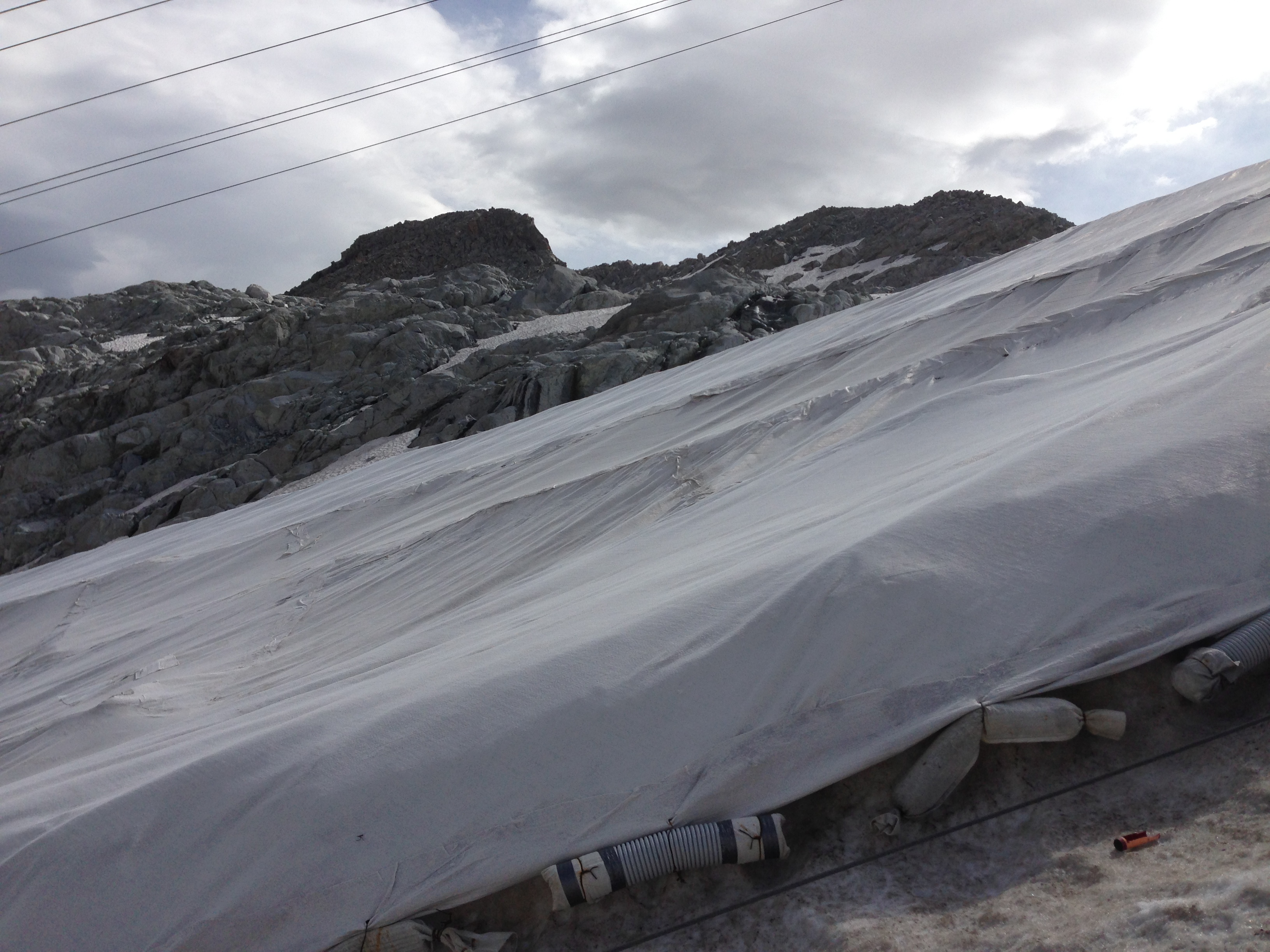 Particolare di un telone geotessile